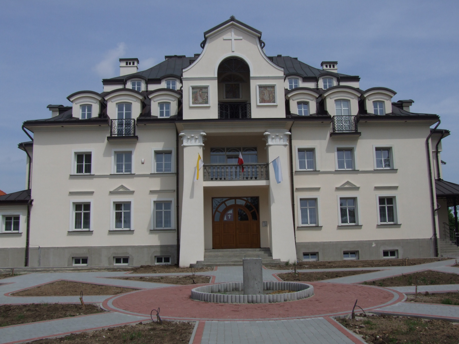 Szczepanów (województwo małopolskie). Plebania.